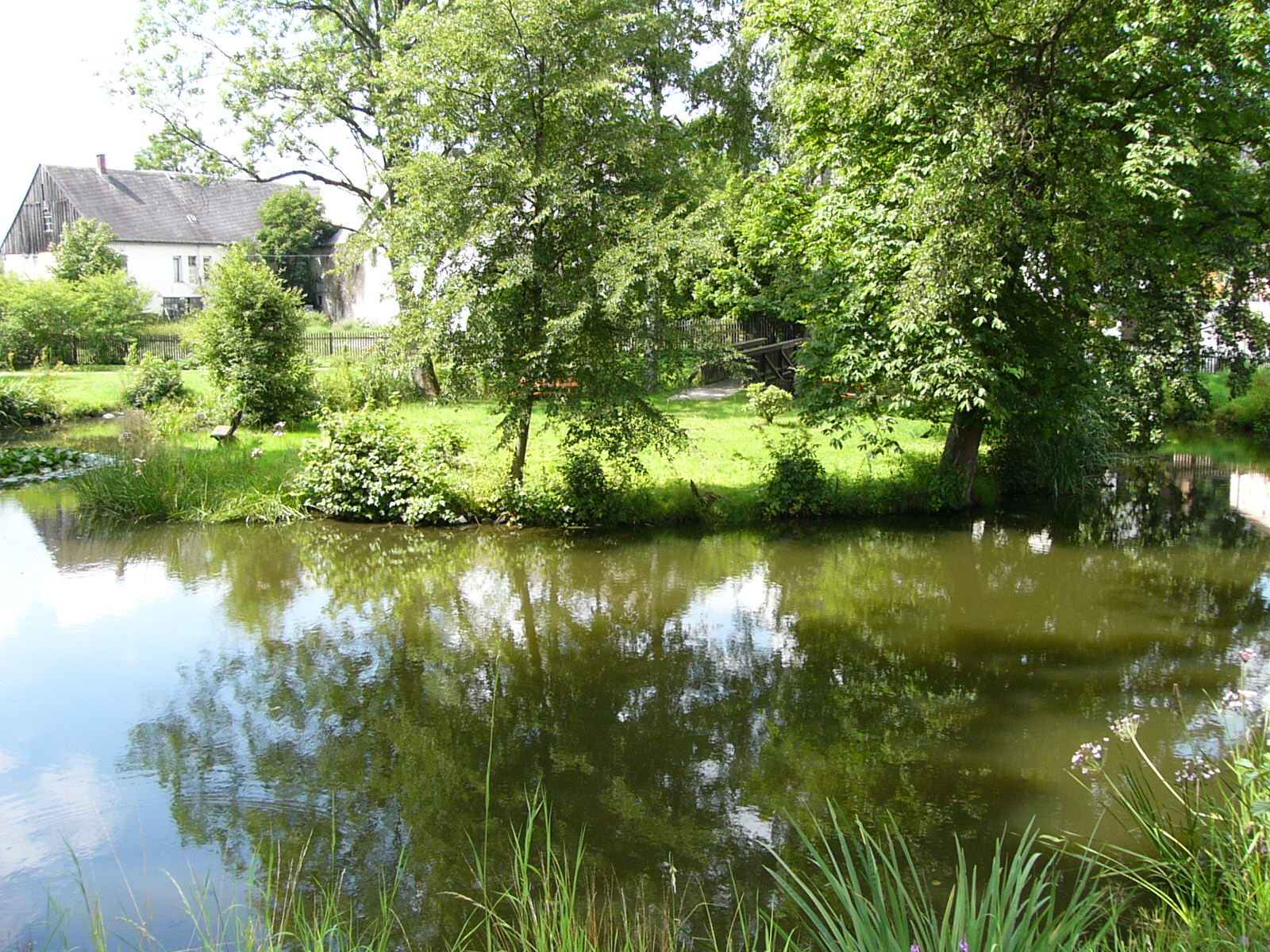 Turmhügelinsel von Tauperlitz